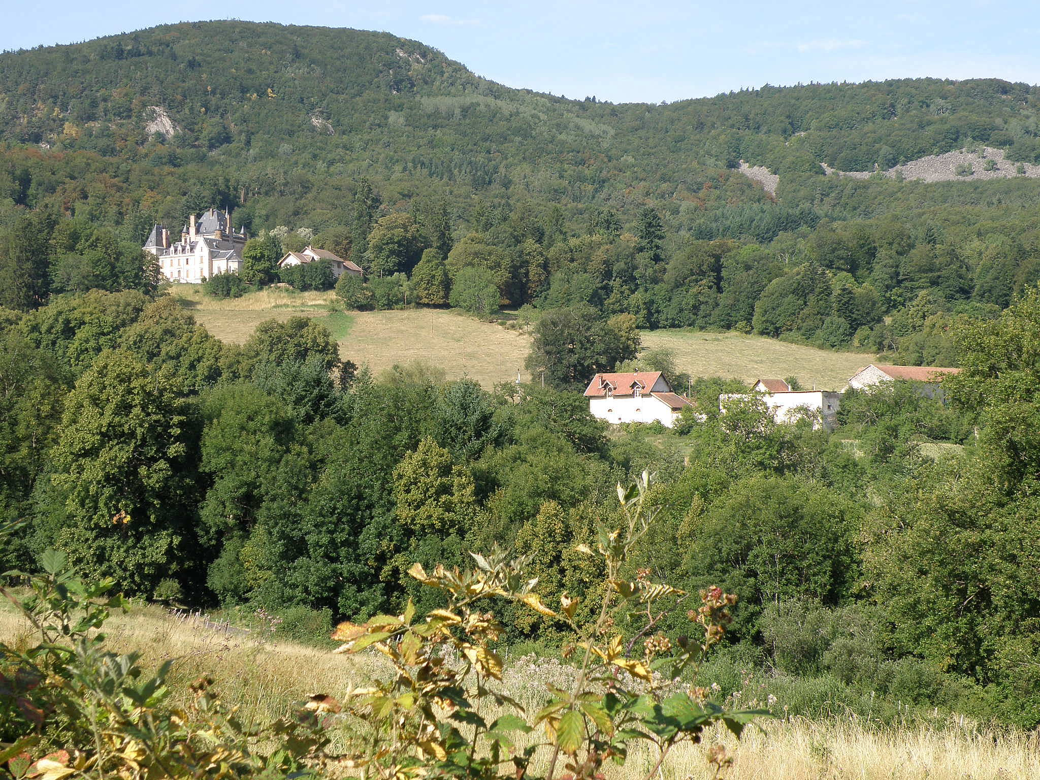 Commune de Saint-Julien-du-Pinet, dép. de la Haute-Loire, France (région Auvergne). Hameau de Vaux au second plan à droite, et, plus éloigné et en contrehaut, le château de Vaux, dans le nord de la commune, photographiés depuis la D72 (le château et son domaine étant propriété privée, il est difficile de s'en approcher davantage). Au fond à gauche, le suc d'Orsier (alt. 1089m), et à droite les Valeyres, tous deux situés dans la commune de Mézères. Coup d'oeil vers le sud-ouest.